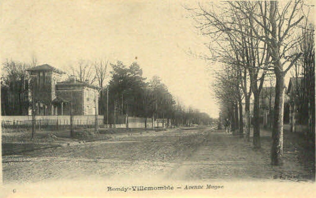 Bondy.Villemomble.Avenue Magne